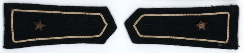 Epaulettes du Service d'ordre légionnaire SOL